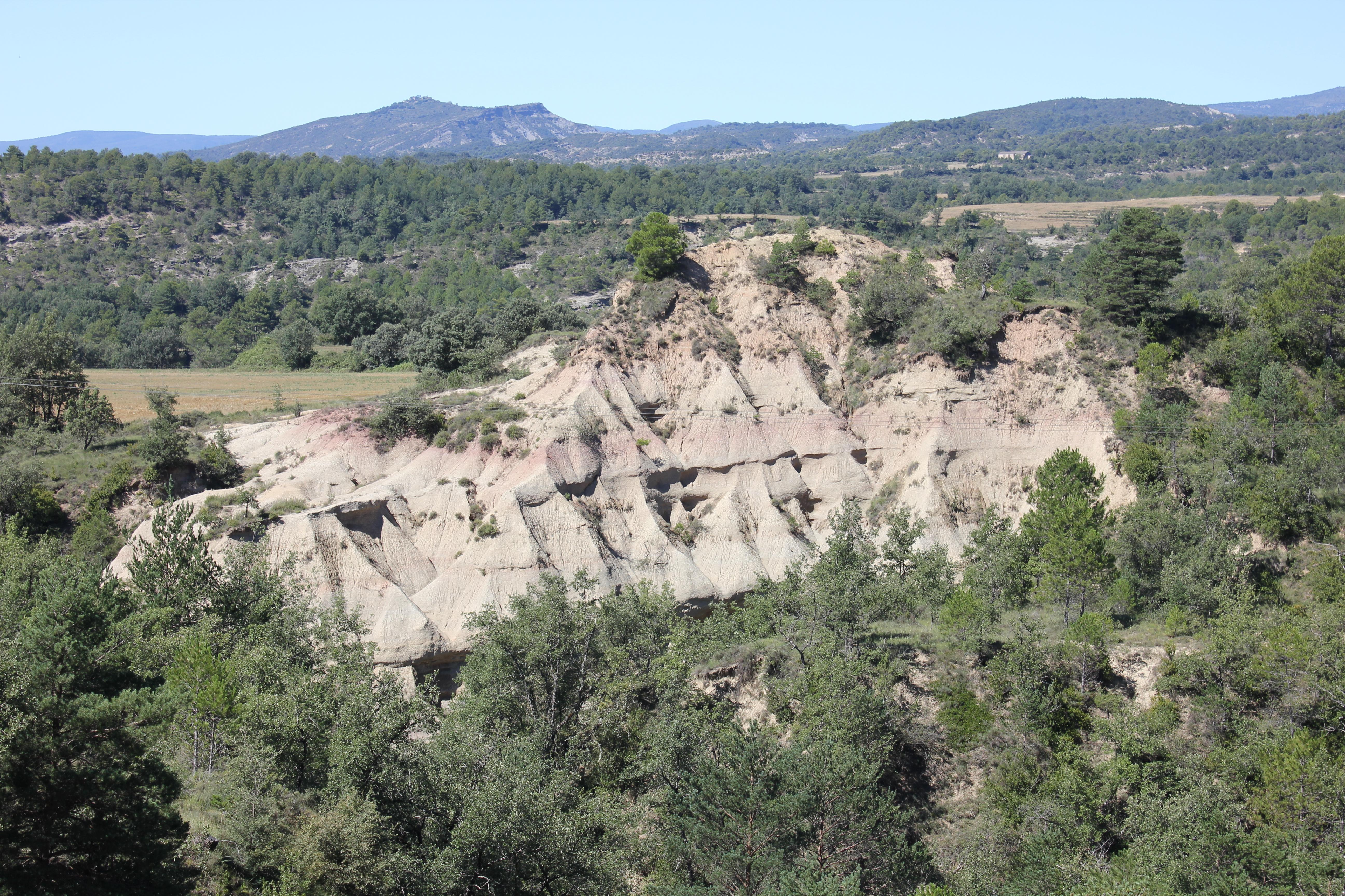 Aragonés: Terreros en a valle d'o Susía.